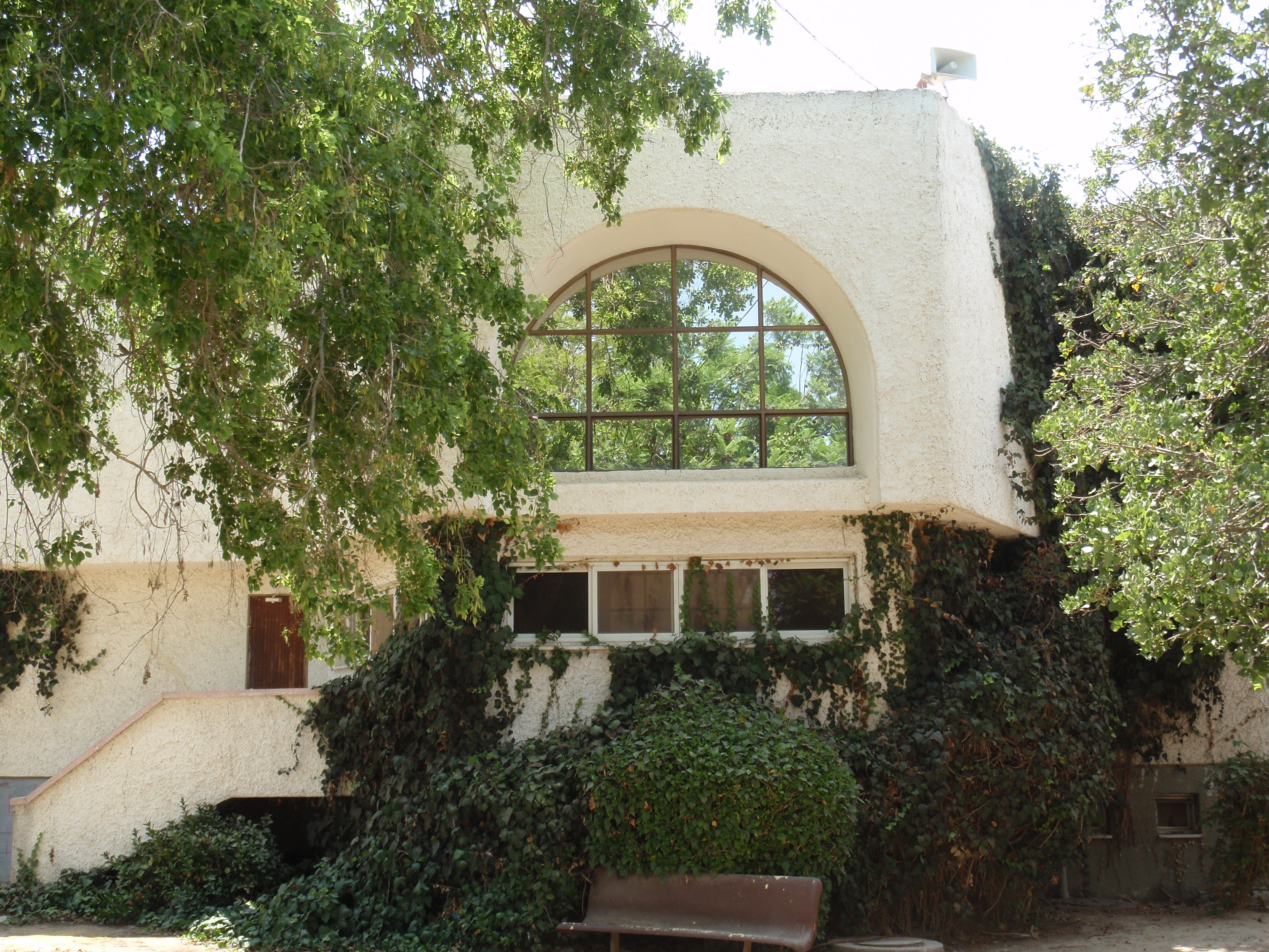 Moshavim ישיבת בני עקיבא בית יהודה בתושיה - כפר מימון